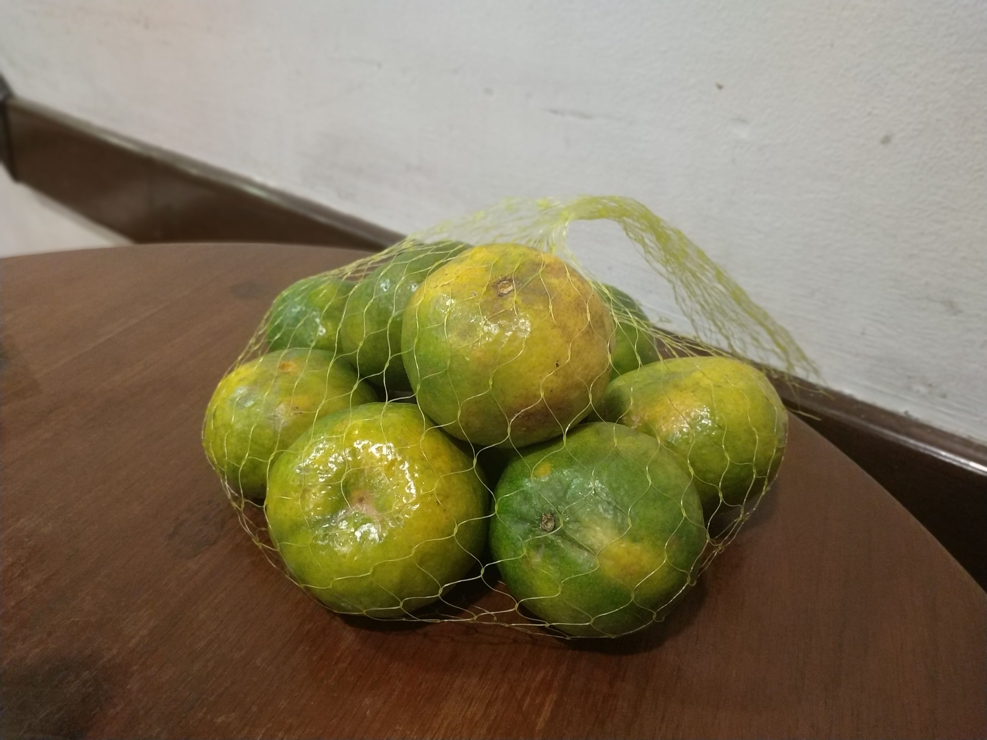 Bolsa tradicional para la venta de frutas en la ciudad de La Paz